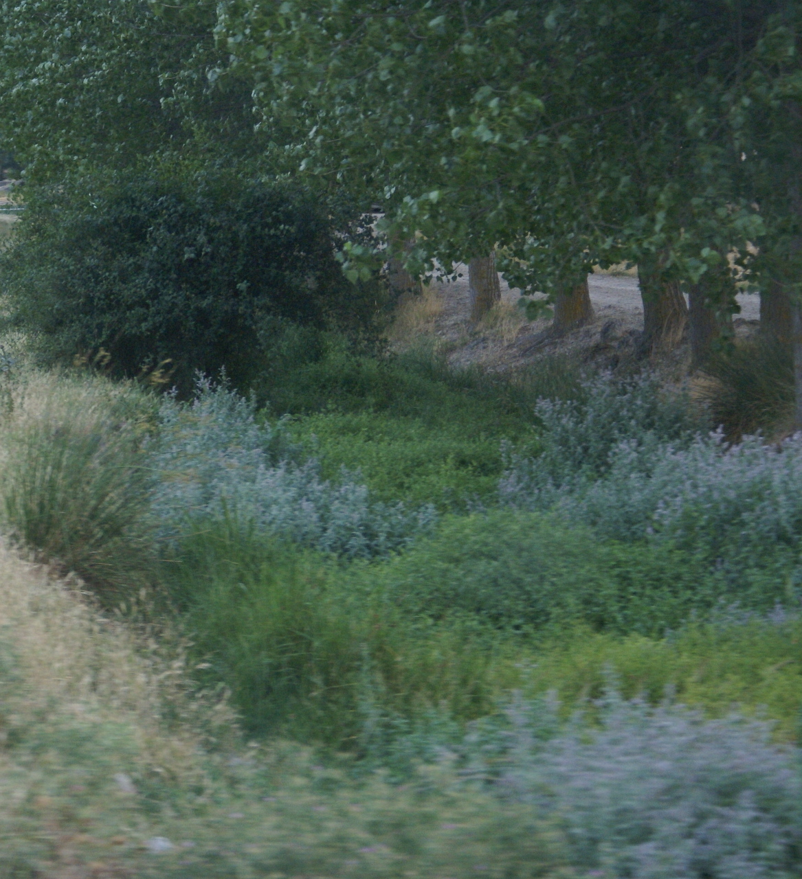 El curso del Valcorba cubierto de vegetación a su paso por Santibáñez de Valcorba.